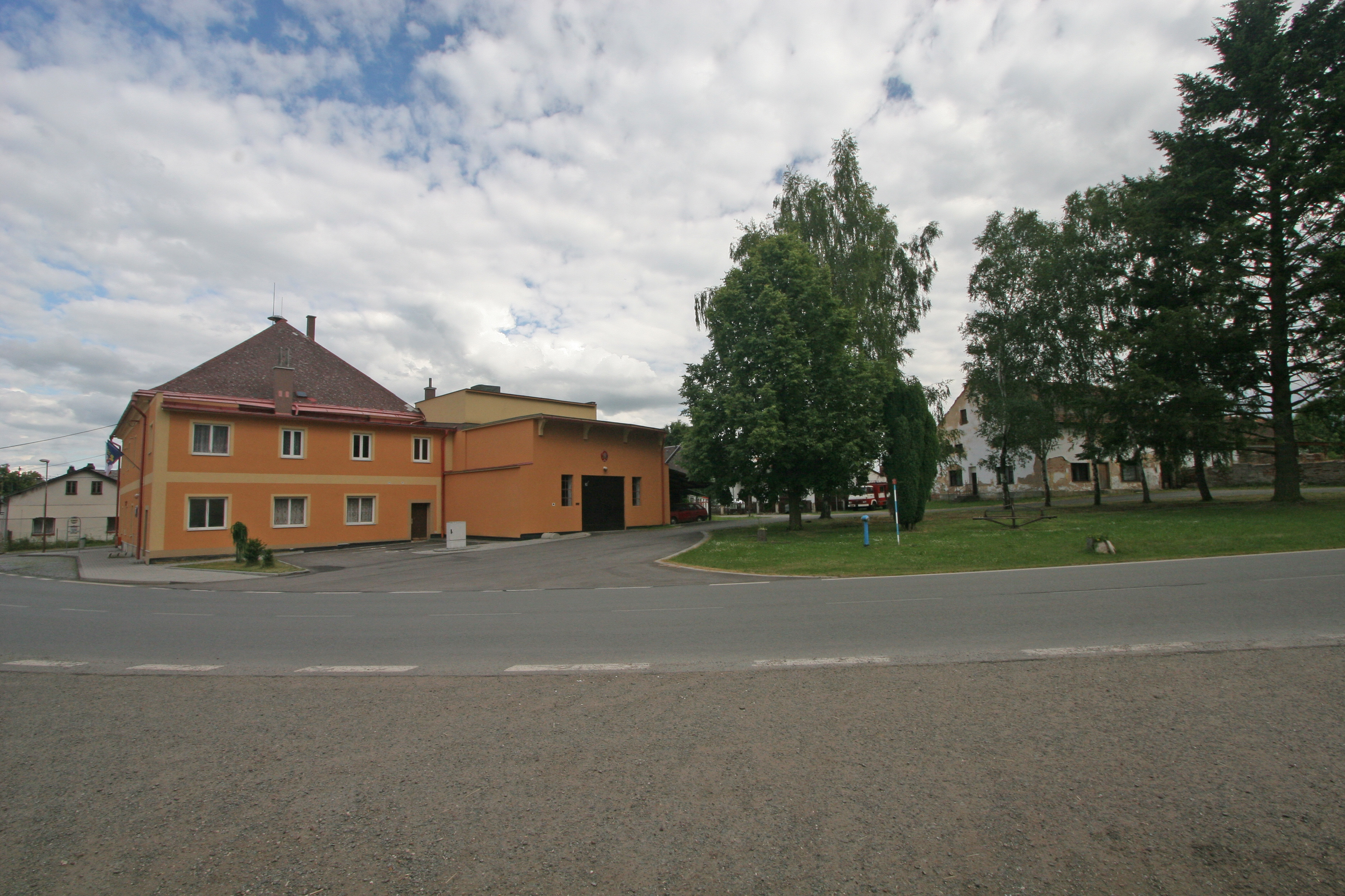 Bílé Poličany obecní úřad